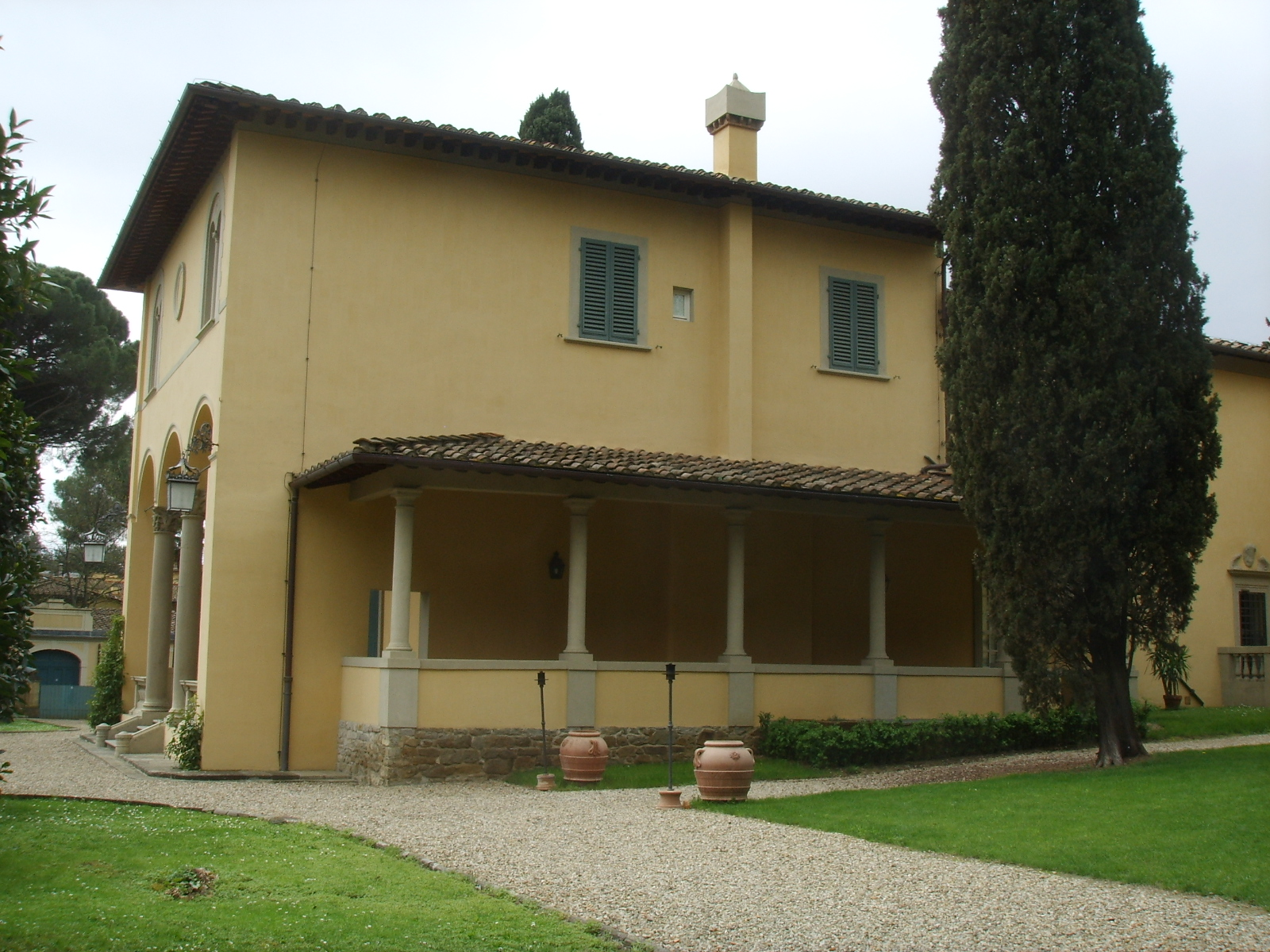 Villa sassetti